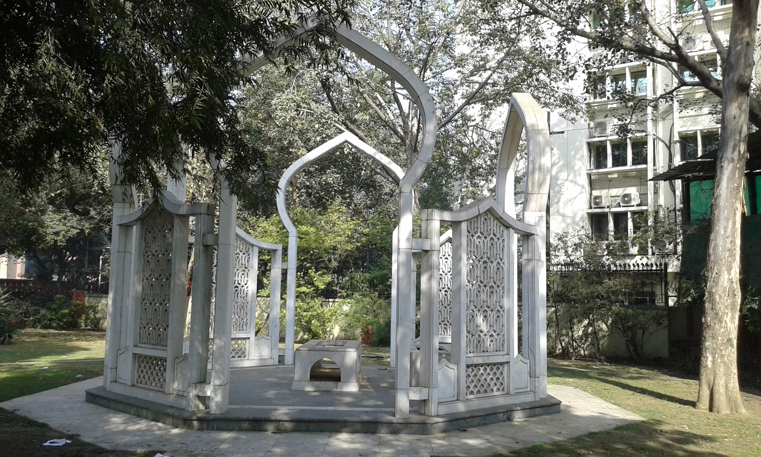 1974 മുതല്‍ 1977 വരെ സ്വതന്ത്ര ഇന്ത്യയുടെ രാഷ്ട്രപതിയായിരുന്നു ഫക്രുദ്ദീന്‍ അലി അഹമ്മദിനെ മറവ് ചെയ്ത സ്ഥലം.